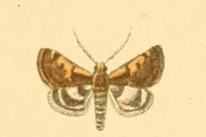 Titanio magnificalis